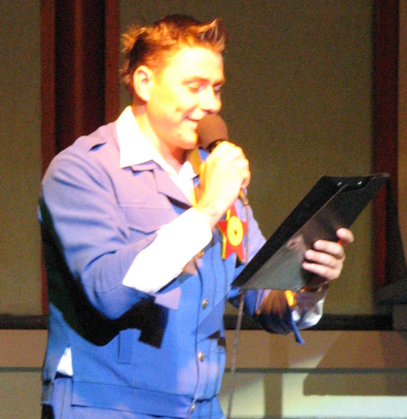 Аркадий Юрьевич Лапухин (команда КВН Уездный город). Выступление в Судаке